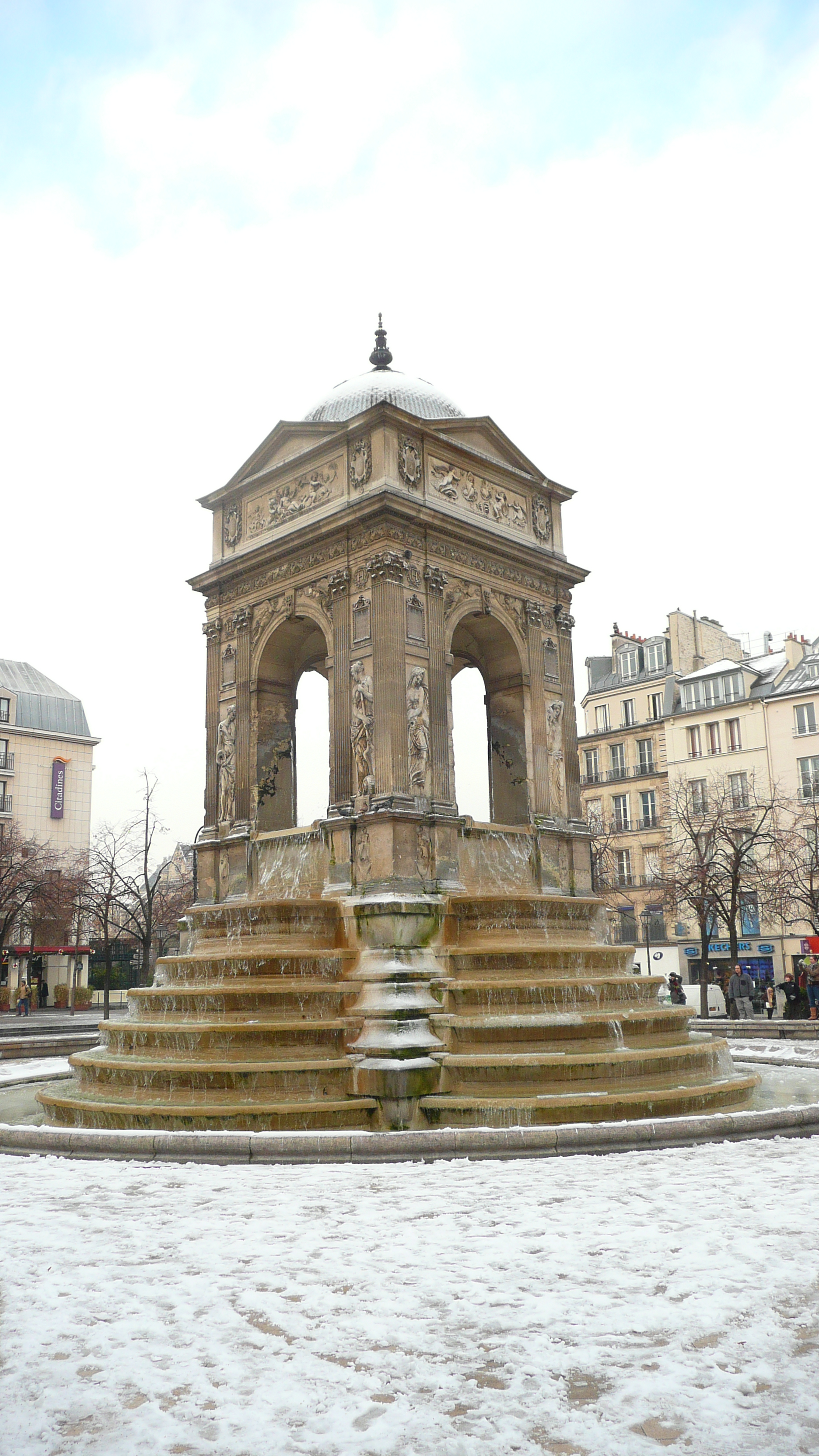 Frozen Fontaine des Innocents - Jean Goujon - last renaissance fountain in Paris